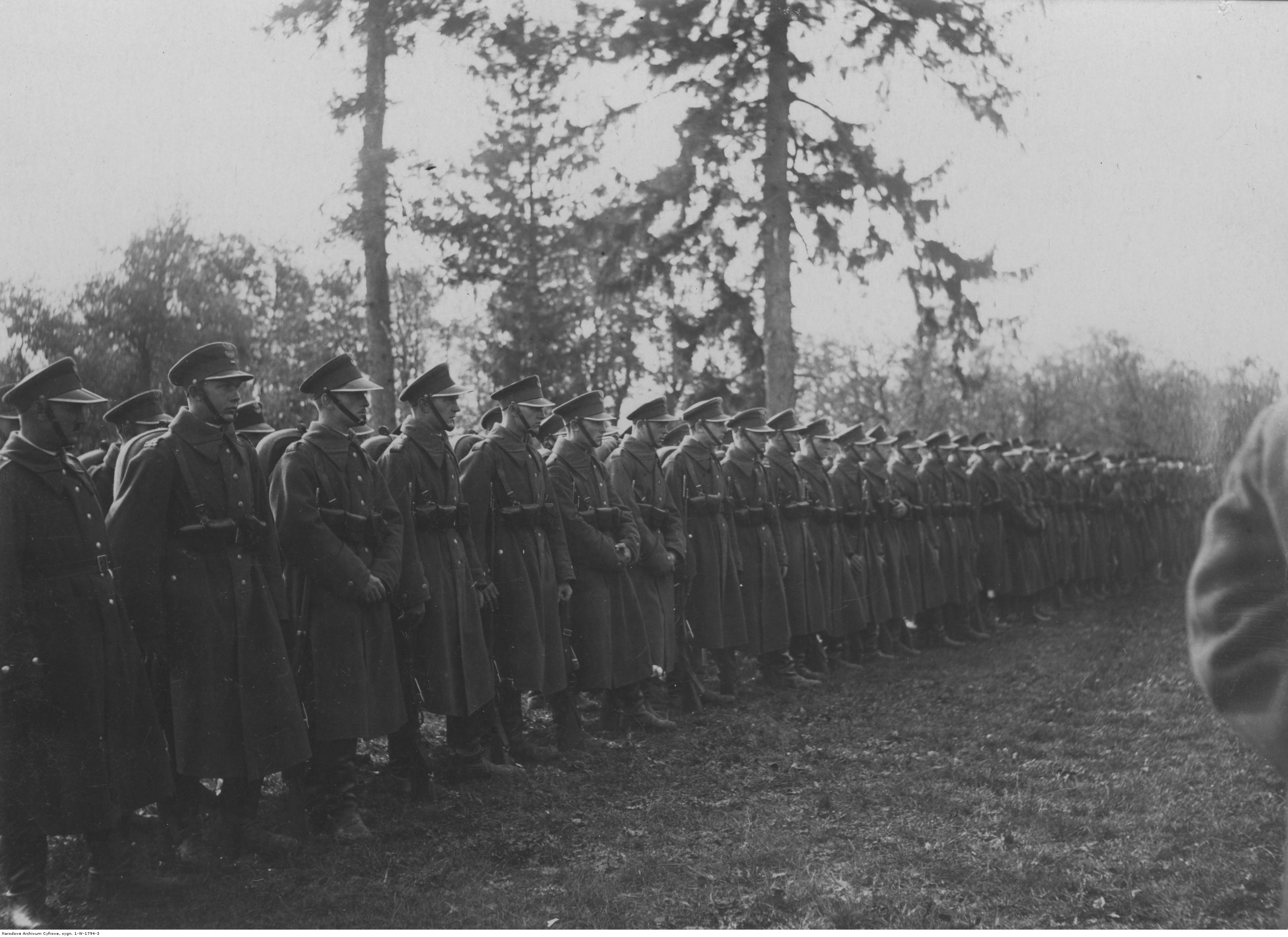 Uroczystości X-lecia istnienia Korpusu Ochrony Pogranicza w kompanii KOP stacjonującej w Turylczu. Kompania strzelców KOP w czasie przemówienia. Koncern Ilustrowany Kurier Codzienny - Archiwum Ilustracji. Sygnatura: 1-W-1794-3